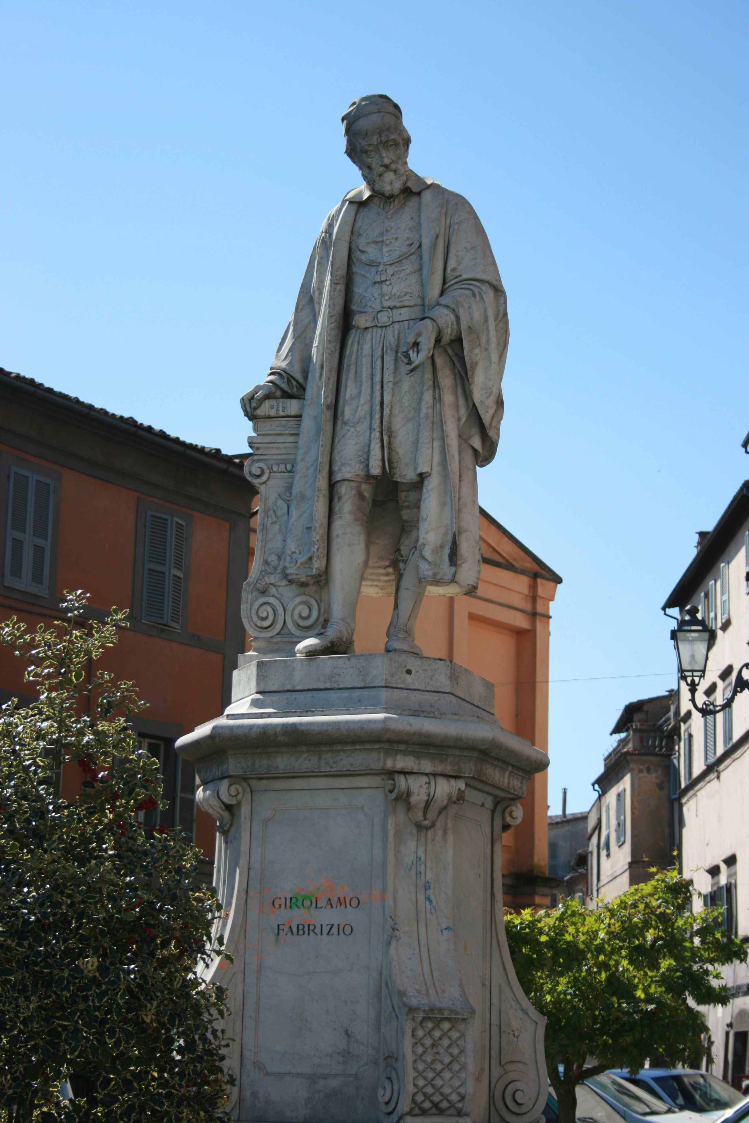 Fabrizio's monument in Acquapendente